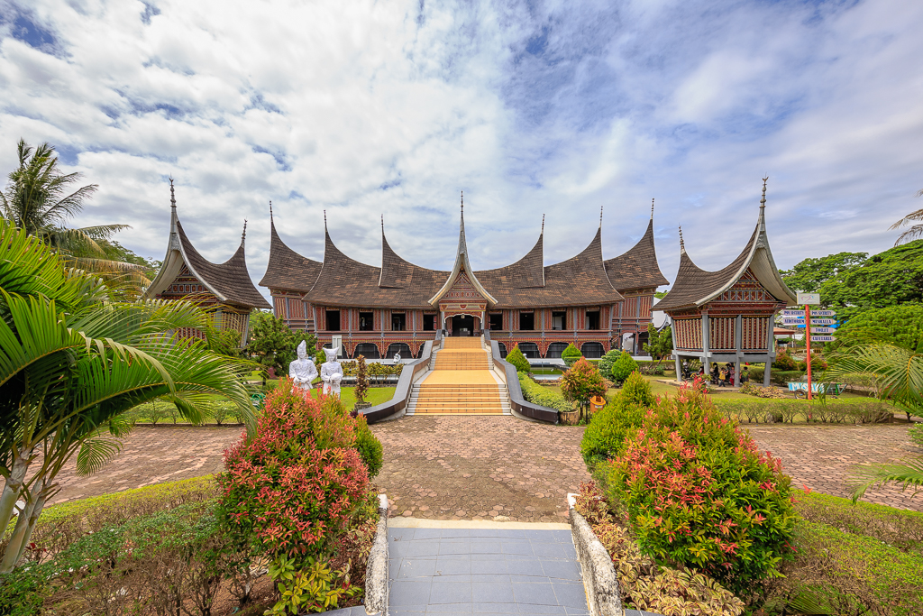 MuseumNagariPadang